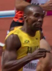 d2_9 400H warholm